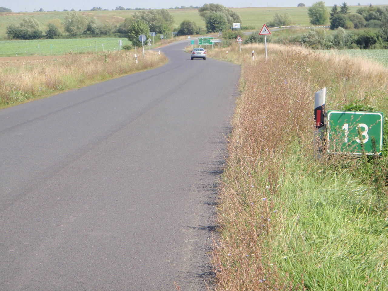 Ehemaliger B89 Steinamangerer Strasse, heute 8901 Nebenstrasse